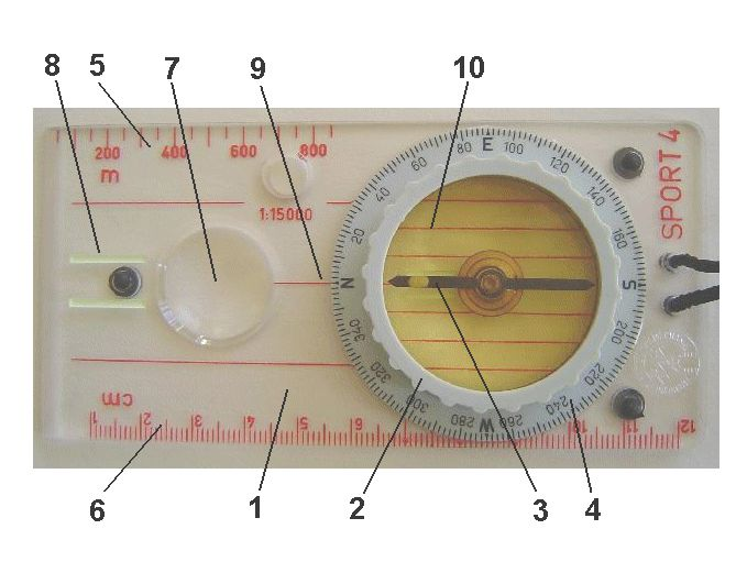 Laptájoló elemei. Az átlátszó, téglalap formájú műanyag lapba (1) helyezik el a szintén átlátszó, és forgatható műanyagból, vagy esetleg üvegből készített szelencét (2), ami tartalmazza magát az iránytűt (3), valamint az ívmérték vagy a fokbeosztás számsorát (4) is. Az alaplap élénél léptékosztást (5), illetve mm beosztást (6) szoktak elhelyezni. A térkép jeleinek könnyebb felismerését a lapban elhelyezett nagyító lencse (7) biztosítja. Az irányzást az É–D irányvonalak (8), leolvasási pont vagy – vonal (9), és a szelence alján elhelyezett É–D irányrések, vagy nyíl (10) segíti elő.